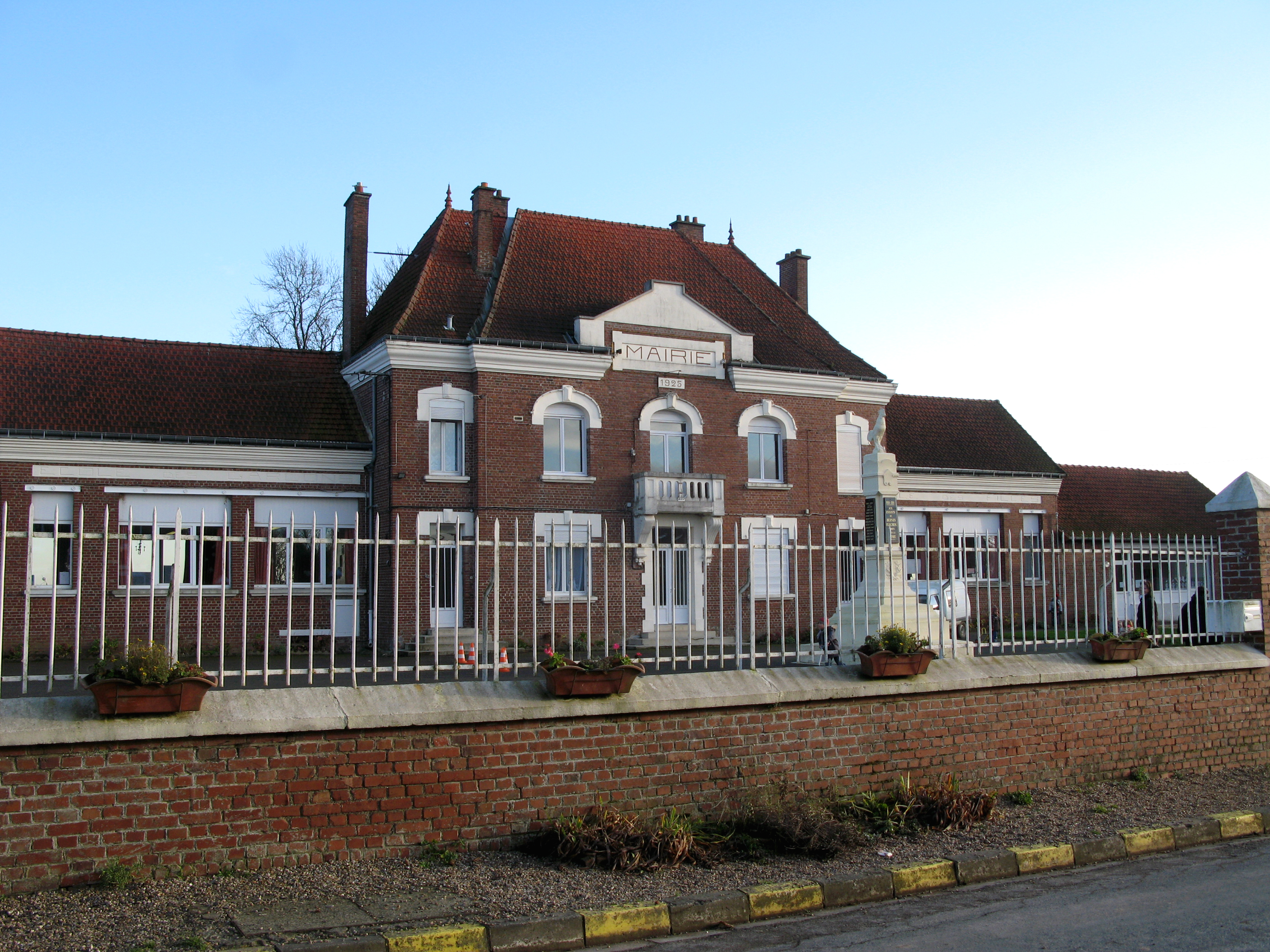 Bernes (Somme, France) - La mairie. .